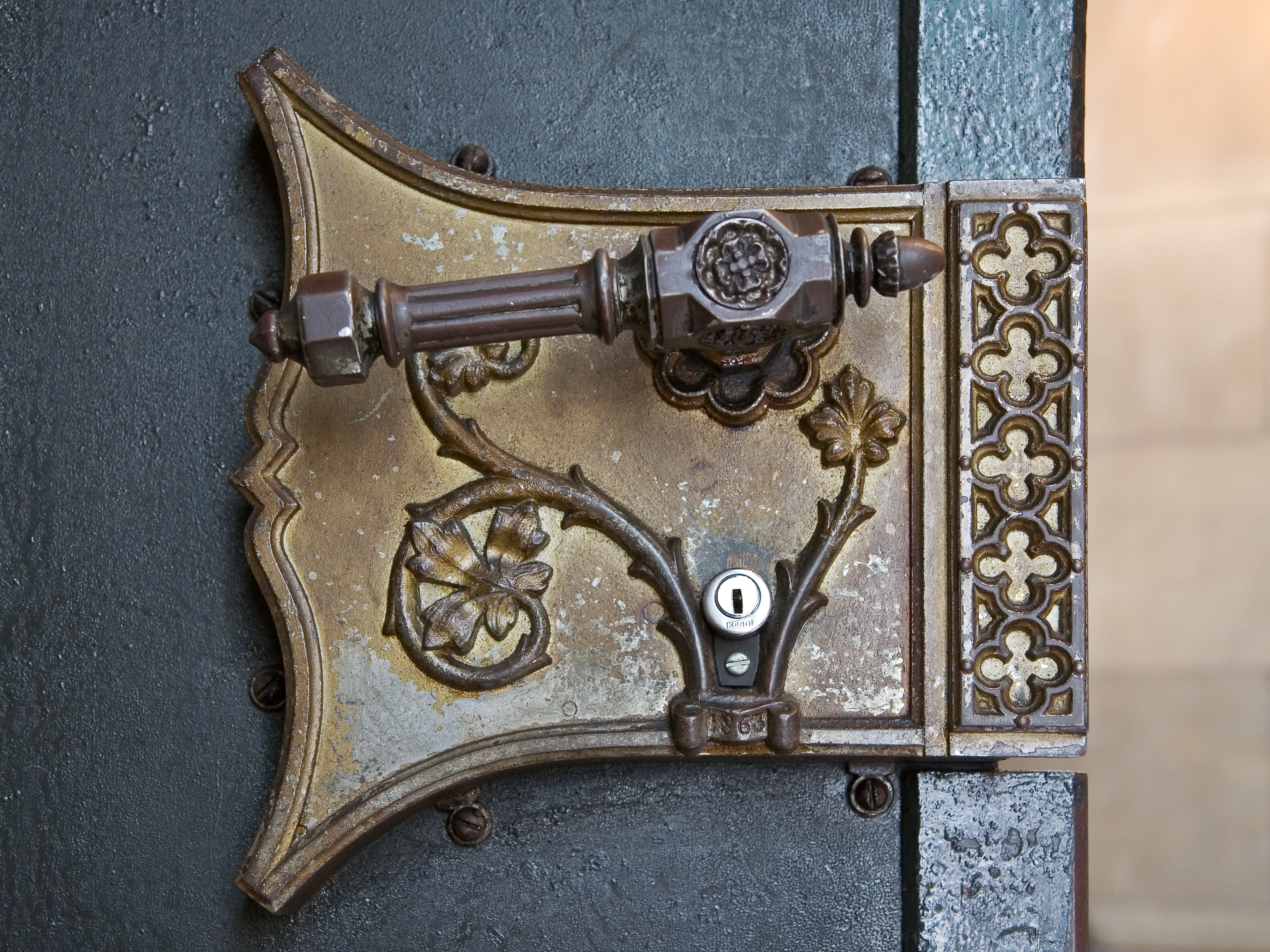 reich verziertes Türschloss eines Seiteneinganges der Elisabethenkirche Basel. Jahreszahl unten 1863